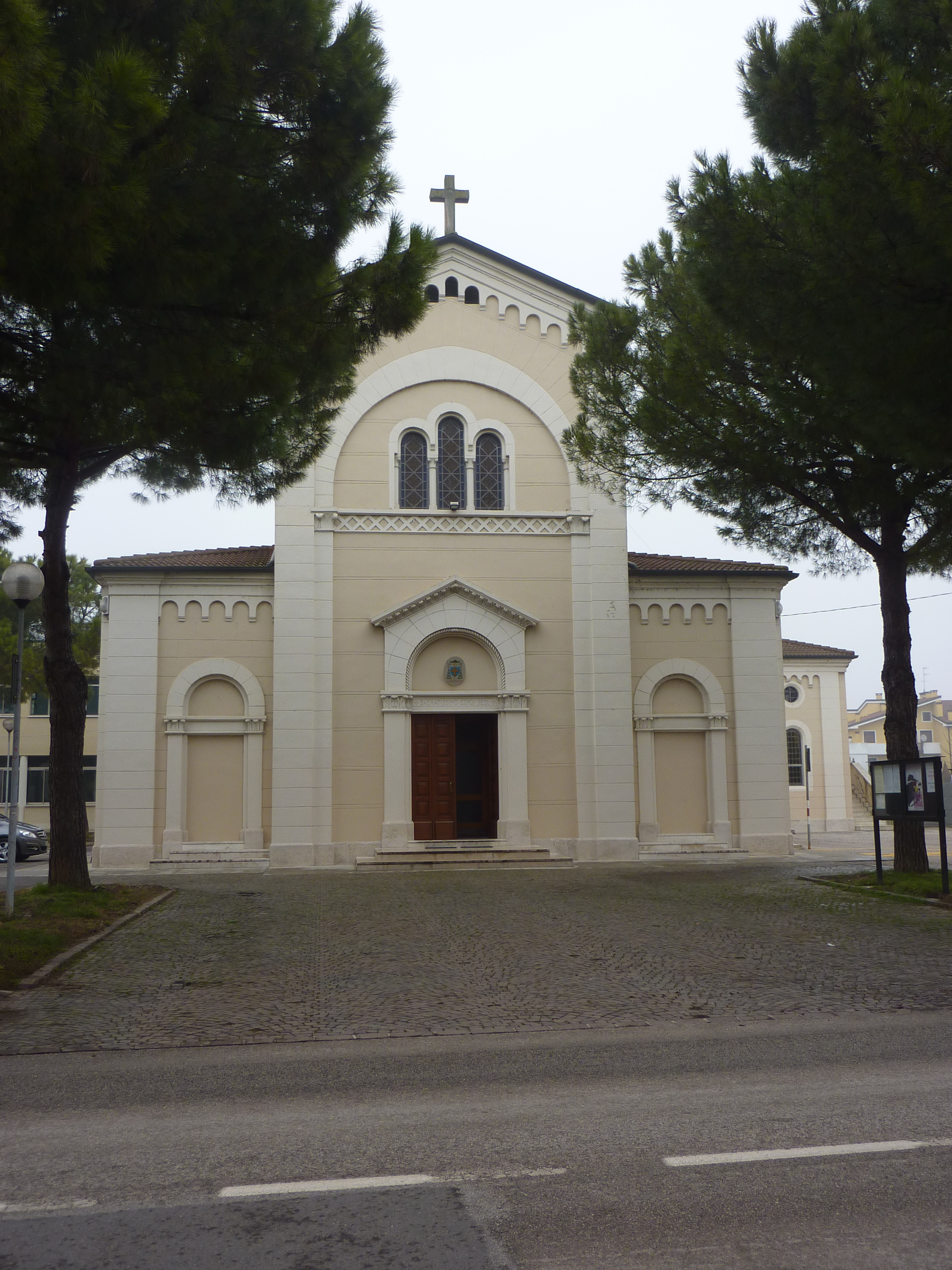 Chiesa parrocchiale dedicata al Sacro Cuore di Gesù - Ponte di Barbarano